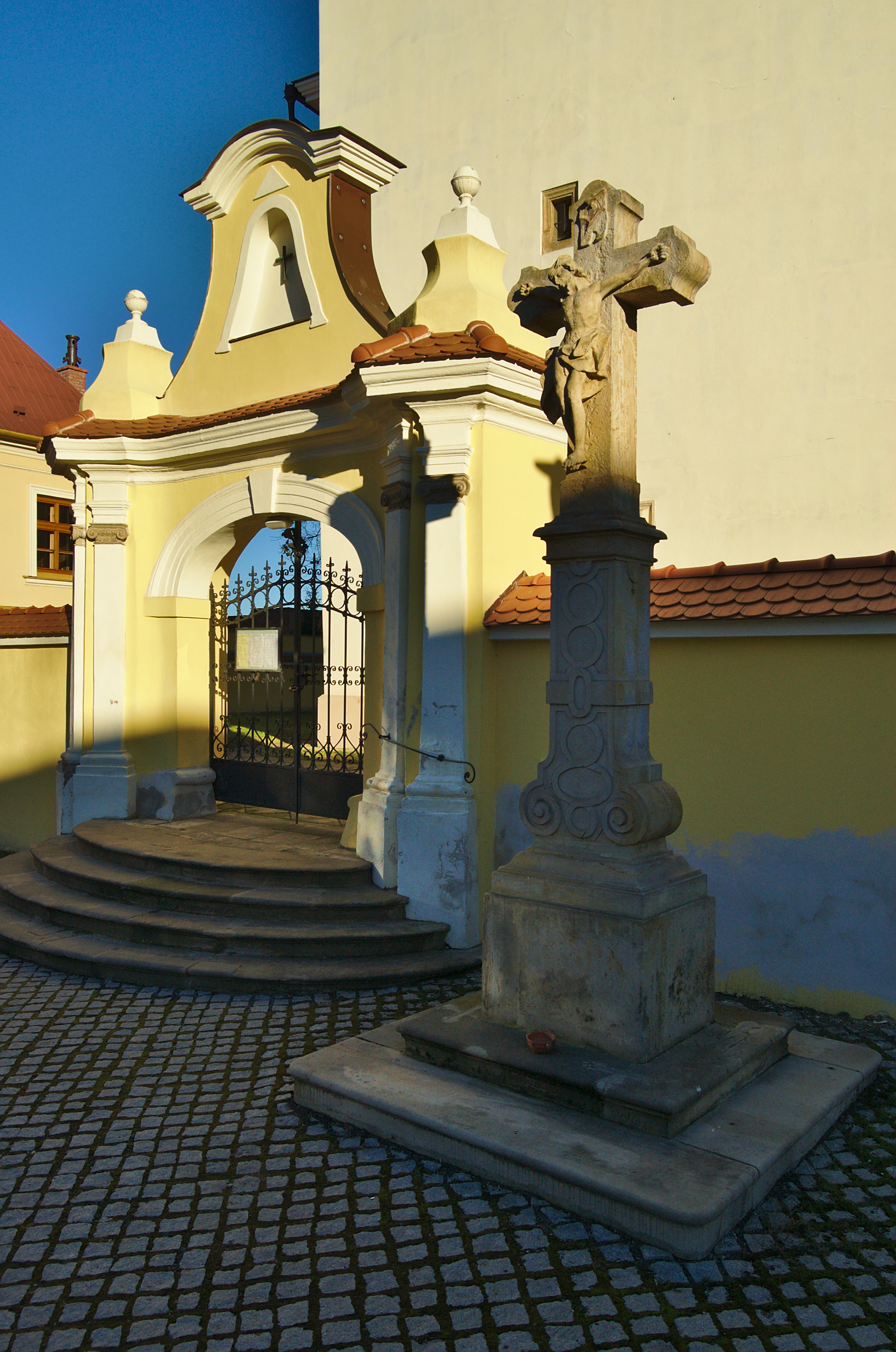 Kříž před kostelem svatého Leonarda, Hněvotín, okres Olomouc